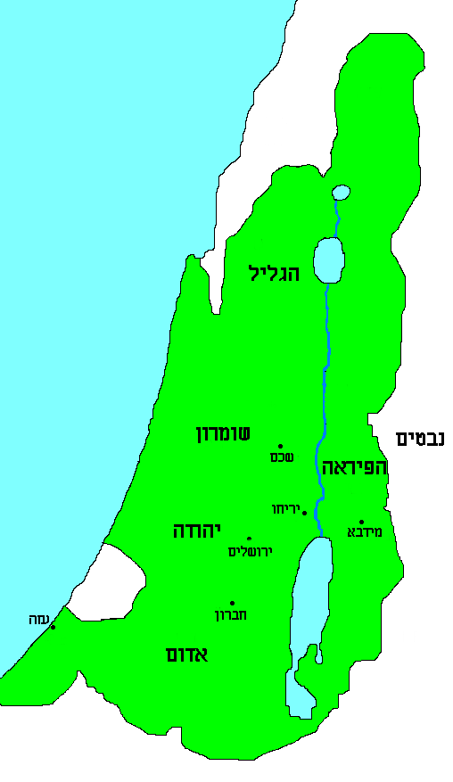 מפה של ממלכת החשמונאים בשיא התפשטותה